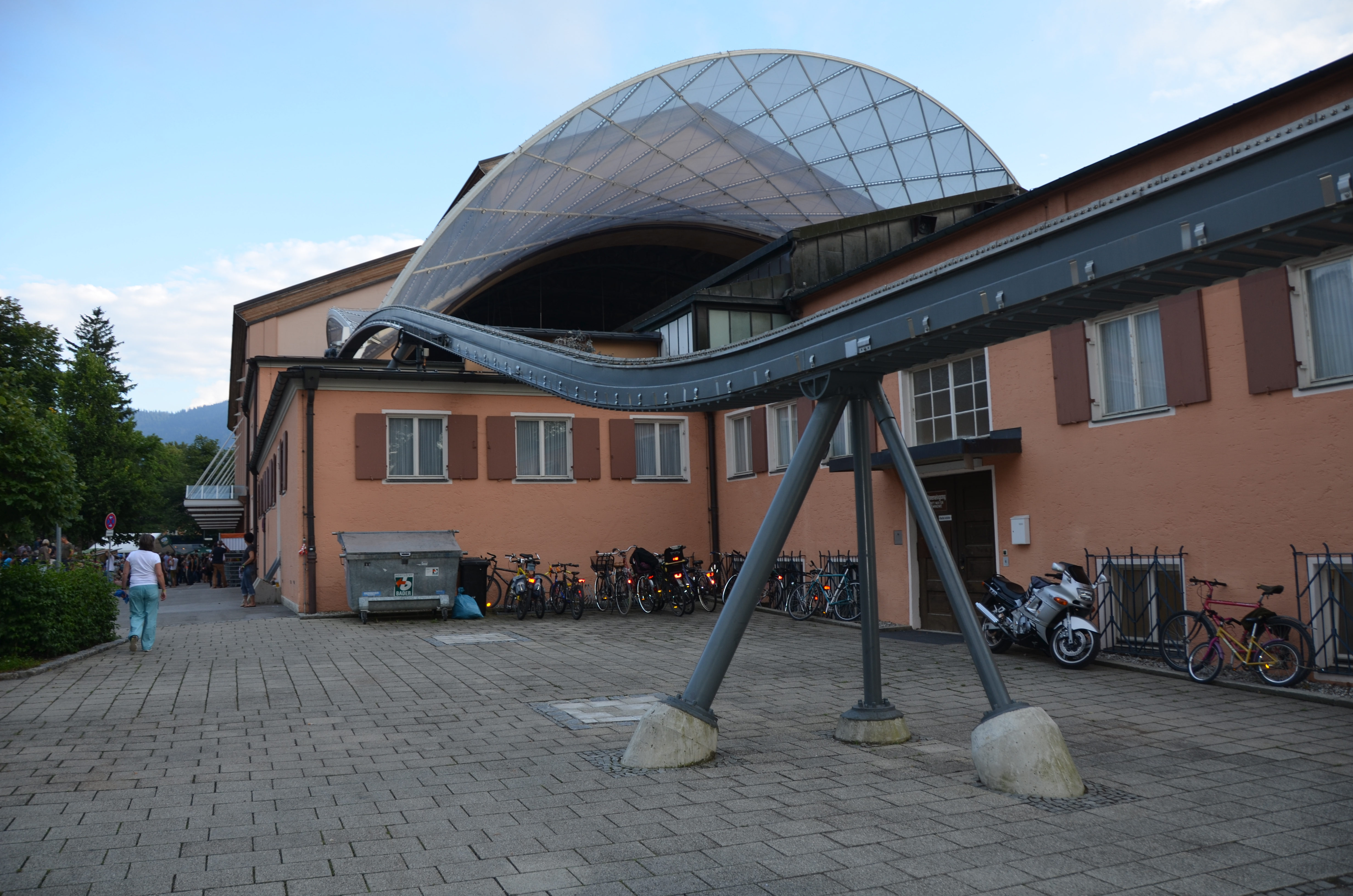 Heimatsound-Festival 2014 in Oberammergau, fahrbares Dach und Schiene des Passionstheater Oberammergau Festivalsommer This photo was created with the support of donations to Wikimedia Deutschland in the context of the CPB project "Festival Summer". This file is made available under the Creative Commons CC0 1.0 Universal Public Domain Dedication. The person who associated a work with this deed has dedicated the work to the public domain by waiving all of their rights to the work worldwide under copyright law, including all related and neighboring rights, to the extent allowed by law. You can copy, modify, distribute and perform the work, even for commercial purposes, all without asking permission. Personality rights warningAlthough this work is freely licensed or in the public domain, the person(s) shown may have rights that legally restrict certain re-uses unless those depicted consent to such uses. In these cases, a model release or other evidence of consent could protect you from infringement claims.